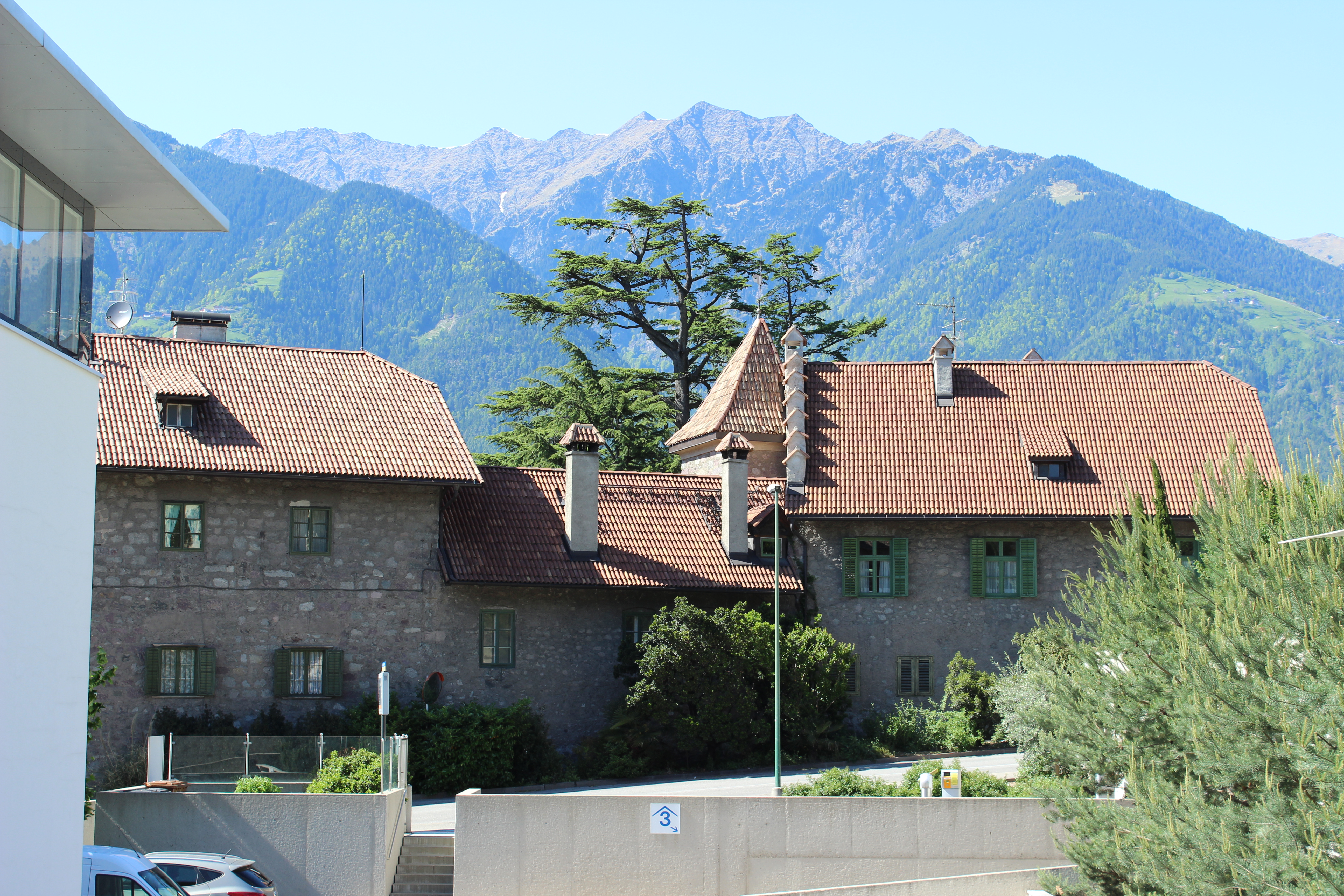 Rosenstein in Meran